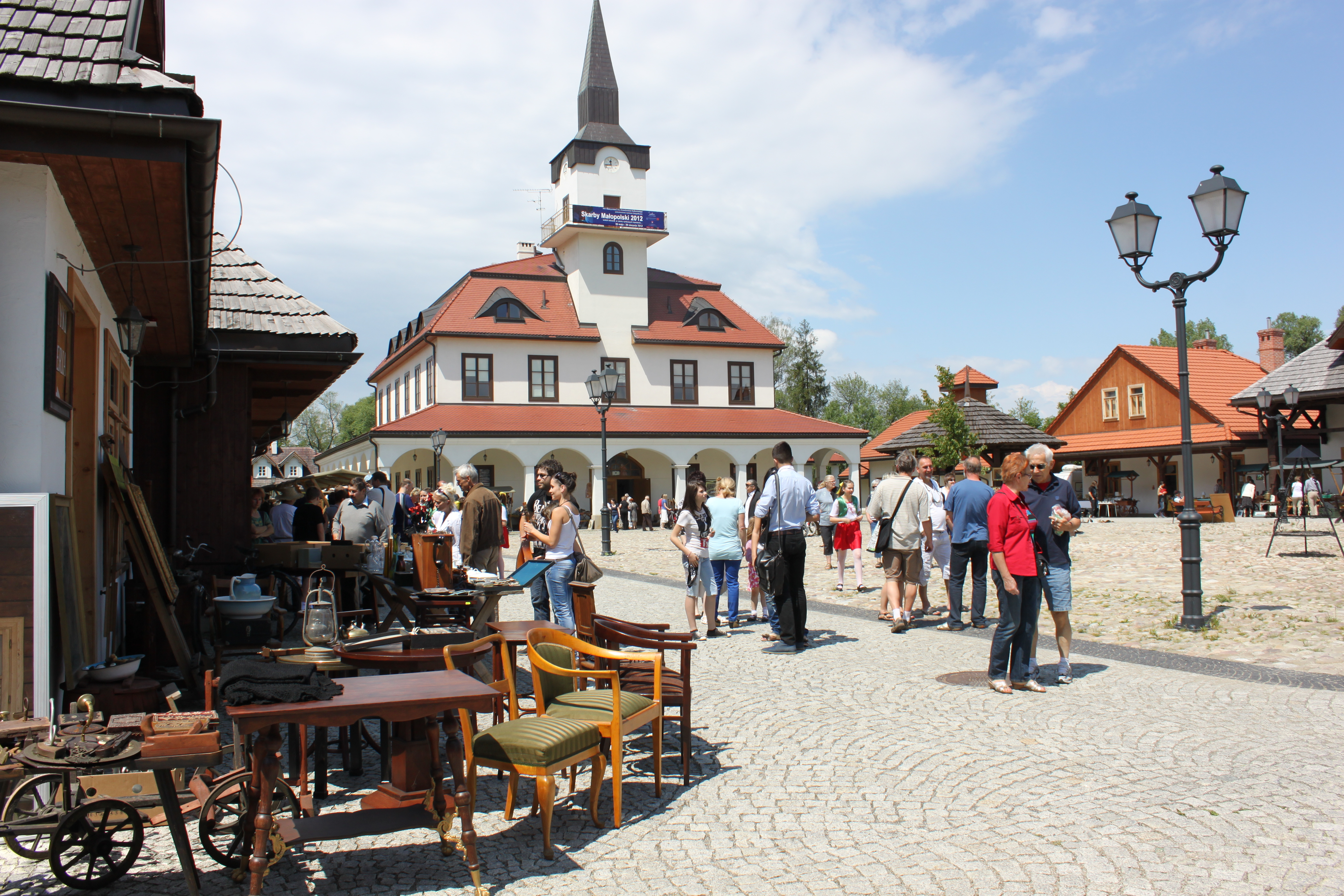 XIV Małopolskie Dni Dziedzictwa Kulturowego, 26-27 maja 2012 fot. P. Hłyń